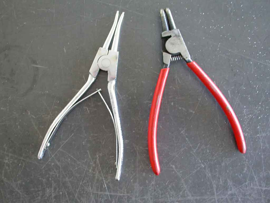 Spreizzangen